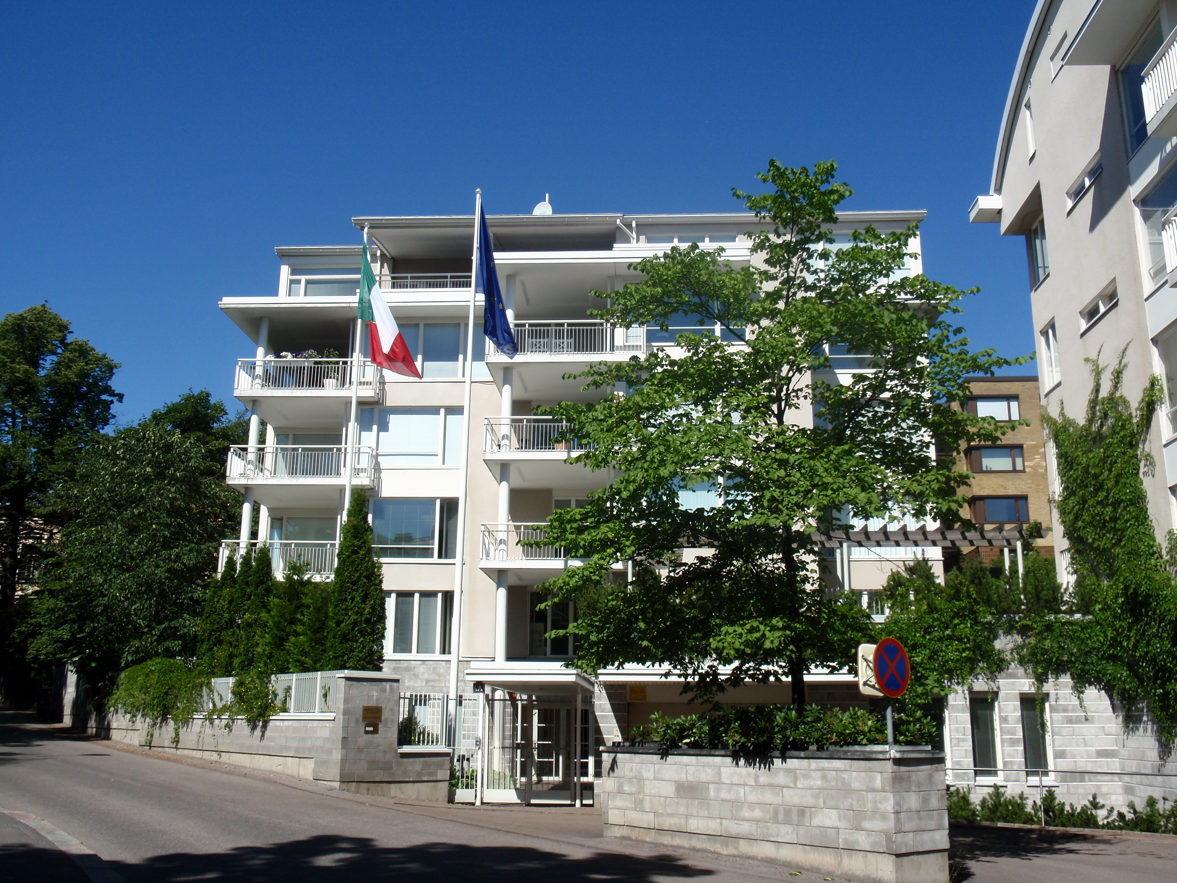 Italian suurlähetystö Helsinki